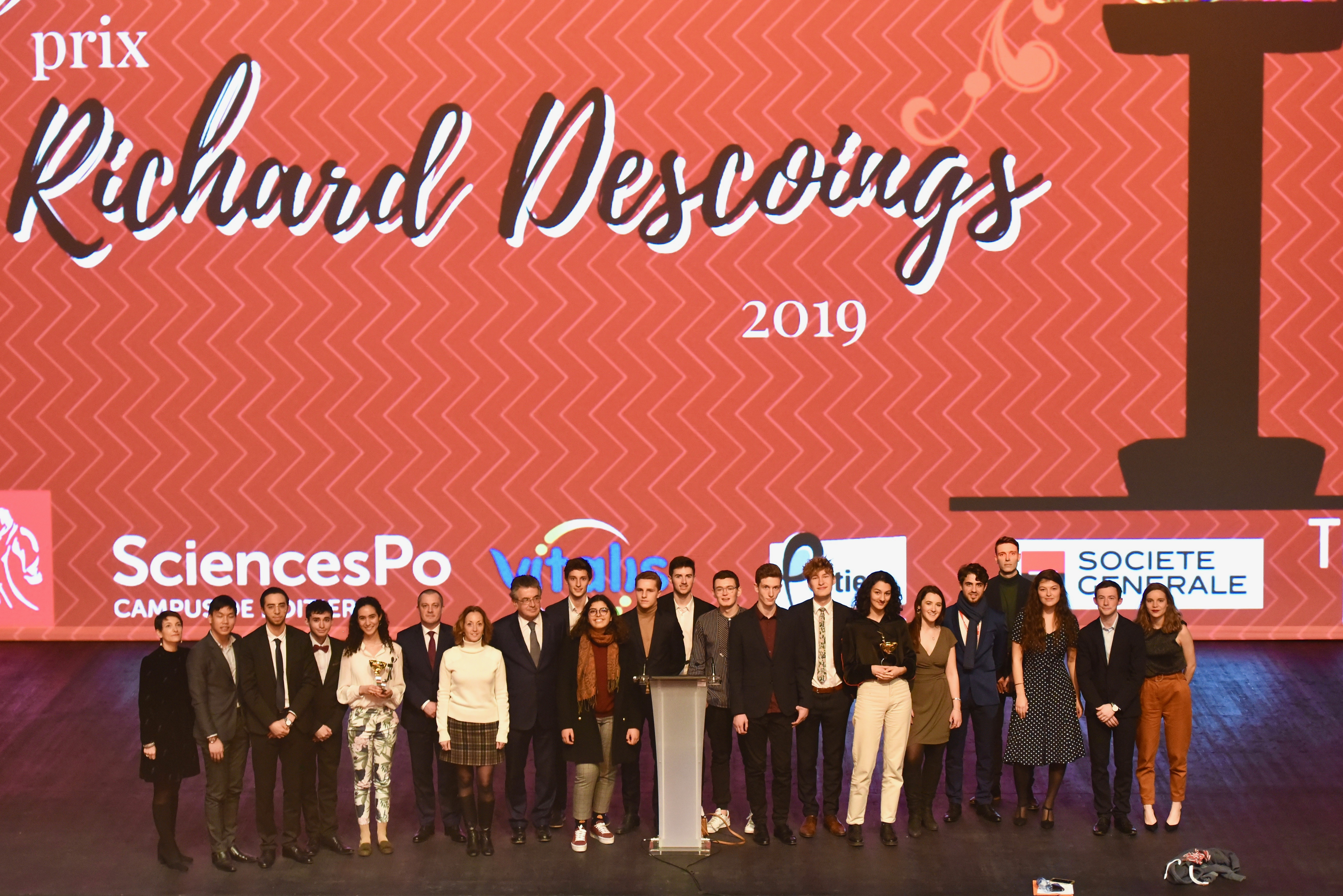 Prix Richard Descoings (2019), Sciences Po